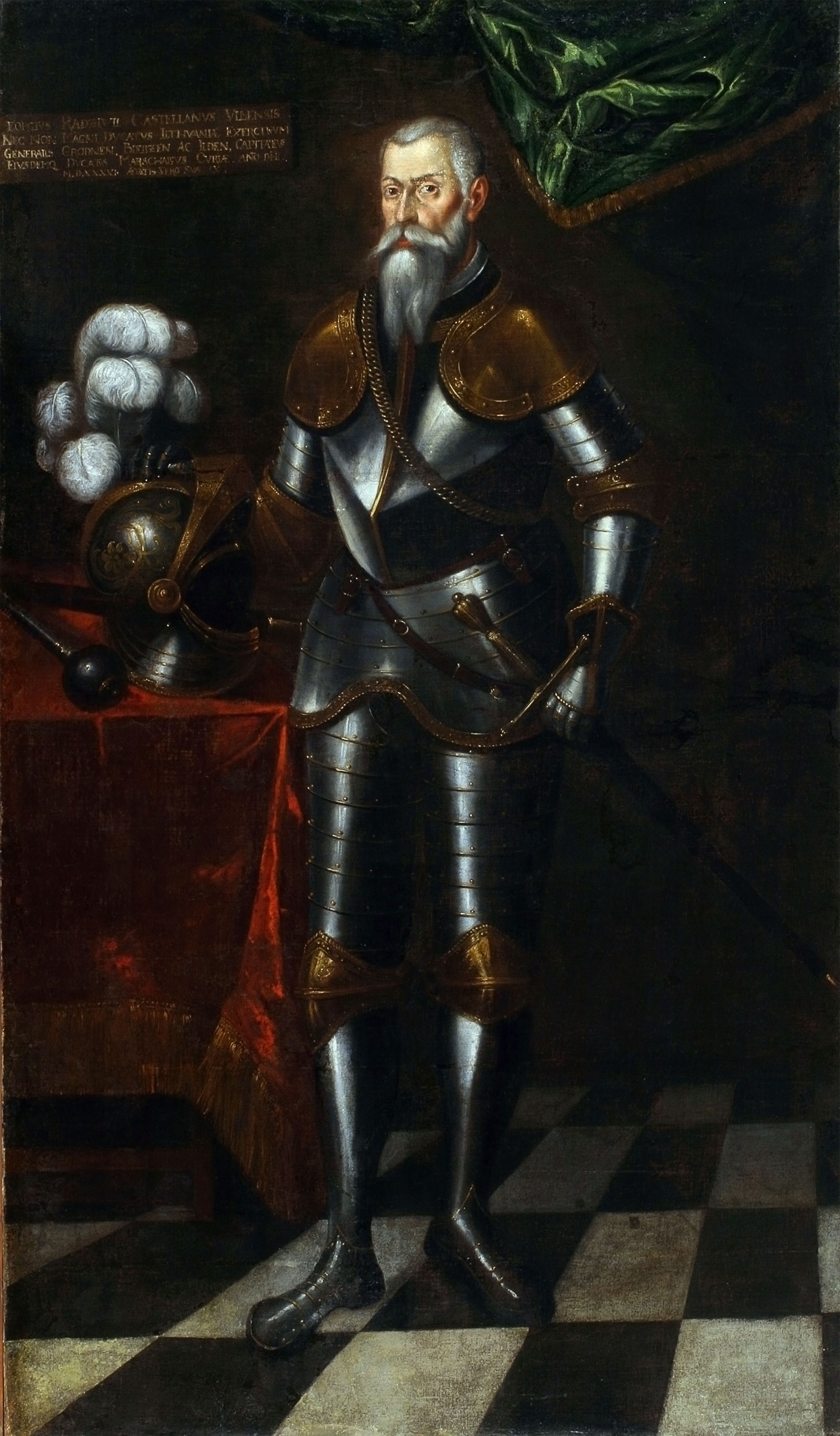 Юрый Радзівіл, Геркулес Літоўскі. Невядомы мастак, 1-я палова XVII ст. Палатно, алей 210×122 см. Нацыянальны мастацкі музей Рэспублікі Беларусь Беларуская (тарашкевіца): Партрэт Юрыя Радзівіла «Геркулеса» (Jury Radzivił «Hierkules»).